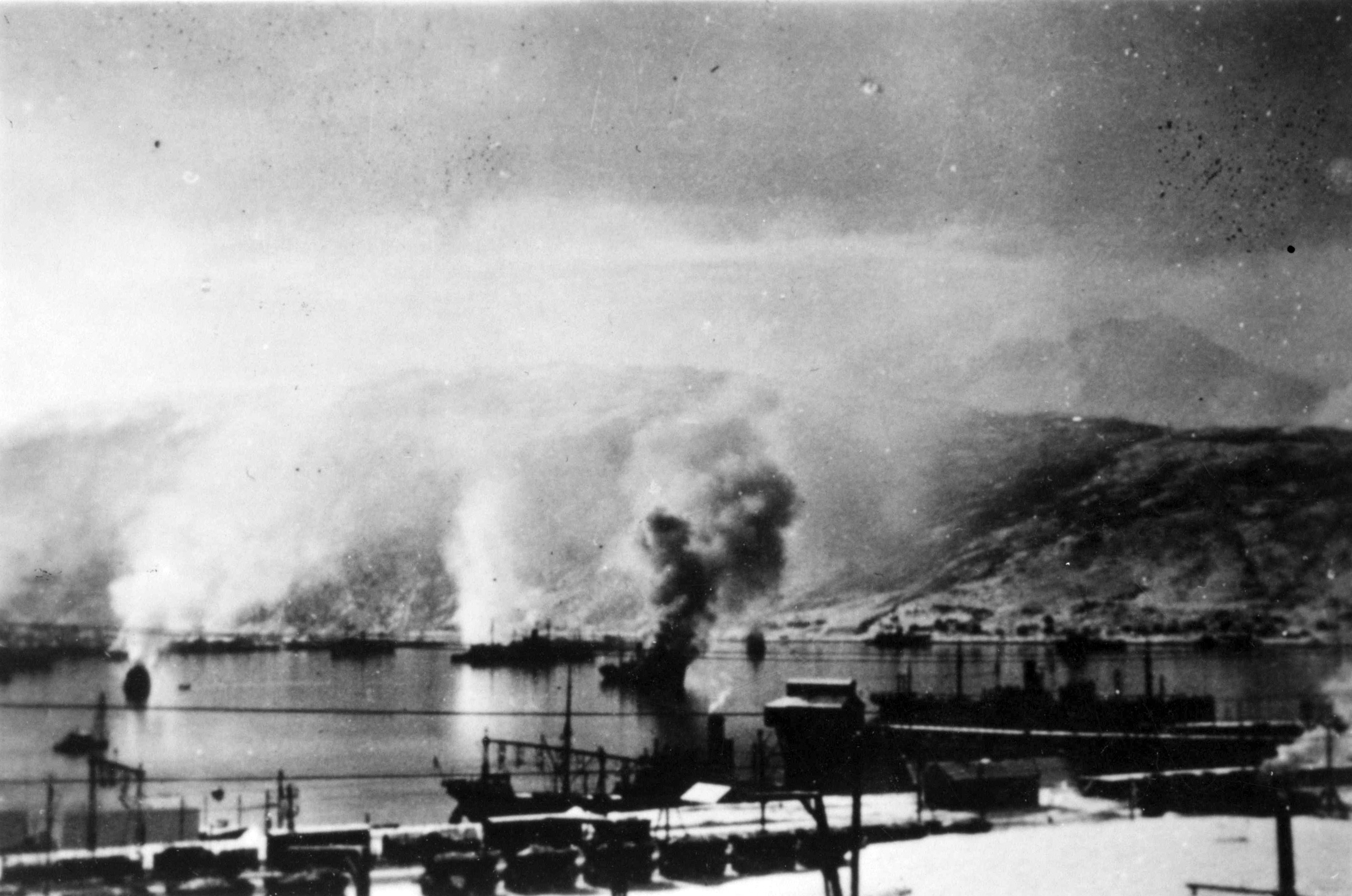 Narvik havn - Kampene om Narvik Tittel / Title: Kampene om Narvik? Dato / Date: 10.04.1940 Fotograf / Photographer: Franz Hollerweger Sted / Place: Narvik, Nordland, Norge Eier / Owner Institution: Arkiv i Nordland Lenke / Link: Arkiv i Nordland Arkivreferanse /Archive reference: AIN.NA143.0207 Fra Dag Skogheims Privatarkiv Tekst bak på bildet: Beschiessung des hapens von Narvik 1940! Dieses foto ist im "Alarmbuch" Seite 61" Arkiv i Nordland Native nameArkiv i NordlandLocationBodøCoordinates67° 17′ 24.37″ N, 14° 33′ 34.77″ E Established1995Web page Authority control : Q11958968 institution QS:P195,Q11958968